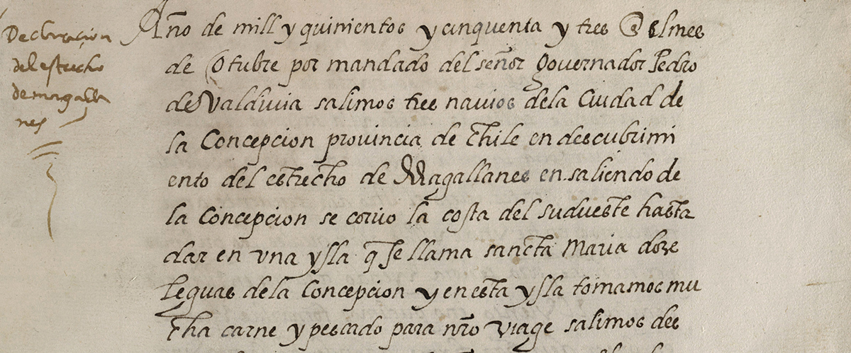 Relación de Hernán Gallego del viaje con Francisco de Ulloa en 1553